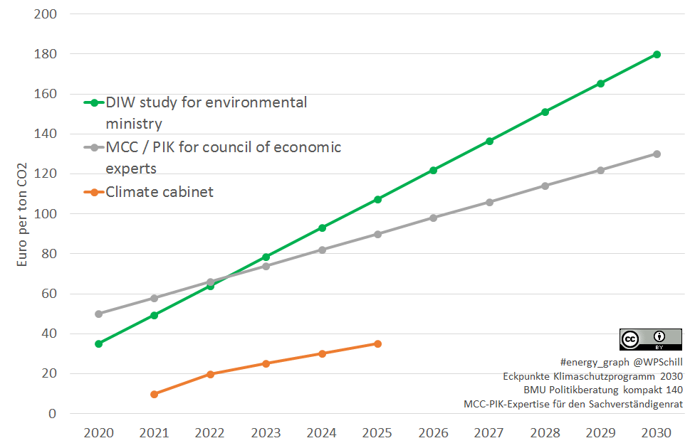 Vergleich des vorgesehenen CO2-Preises des Klimakabinetts vs. Empfehlungen durch Wissenschaftler